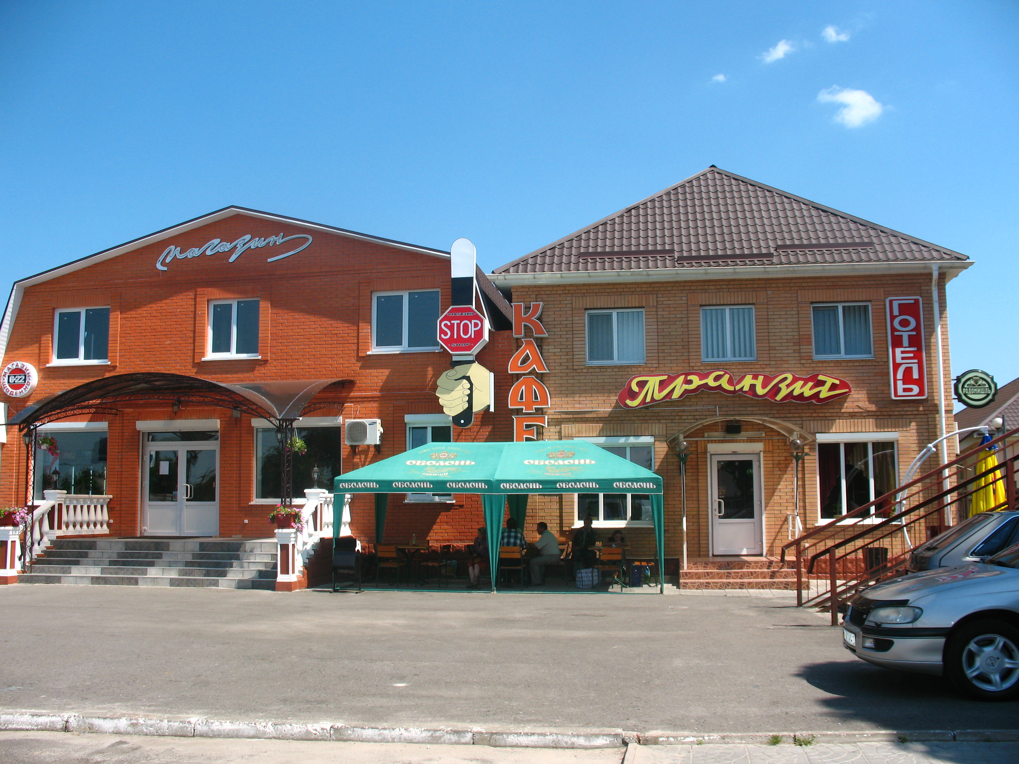 Магазин, отель "Транзит", кафе